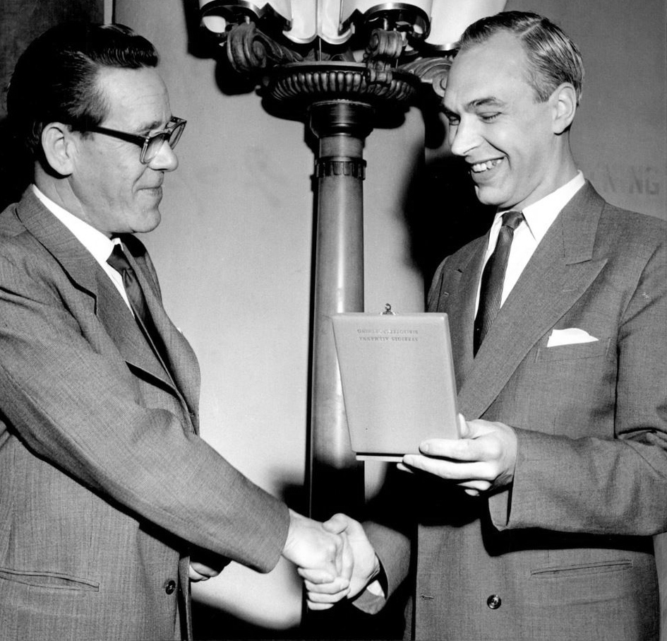 Talman Gustaf Nilsson överlämnar Nils Holgersson-plaketten till författaren Harry Kullman. Till minne av den klassiska barnboken i svensk litteratur, berättelsen om pojken som per gåsrygg utforskade hela sitt fosterland, utdelades på onsdagen till författaren Harry Kullman Nils Holgersson-plaketten för bästa barnbok. Detta skedde vid Sveriges allmänna biblioteksförenings 40:e årsmöte i Stockholm, till vilket till vilket runt 250 bibliotekarier från hela landet mött upp.